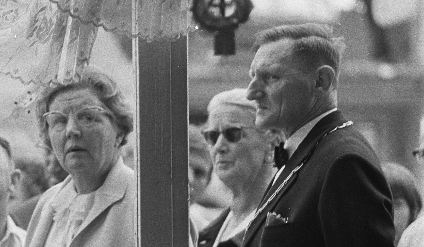 Collectie / Archief : Fotocollectie Anefo Reportage / Serie : De koningin bezoekt het rampgebied Tricht Beschrijving : koningin Juliana spreekt met enige slachtoffers Annotatie : Tricht (Betuwe) wordt op zondag 25 juni 1967 getroffen door een zware tornado; gevolg: 5 doden, 32 gewonden en 500 mensen raken dakloos. 50 huizen worden totaal verwoest, 150 andere raken zwaar beschadigd. Datum : 26 juni 1967 Locatie : Gelderland, Tricht Trefwoorden : bezoeken, koninginnen, rampen, slachtoffers Persoonsnaam : Juliana (koningin Nederland), Juliana, koningin Fotograaf : Fotograaf Onbekend / Anefo Auteursrechthebbende : Nationaal Archief Materiaalsoort : Negatief (zwart/wit) Nummer archiefinventaris : bekijk toegang 2.24.01.05 Bestanddeelnummer : 920-4364